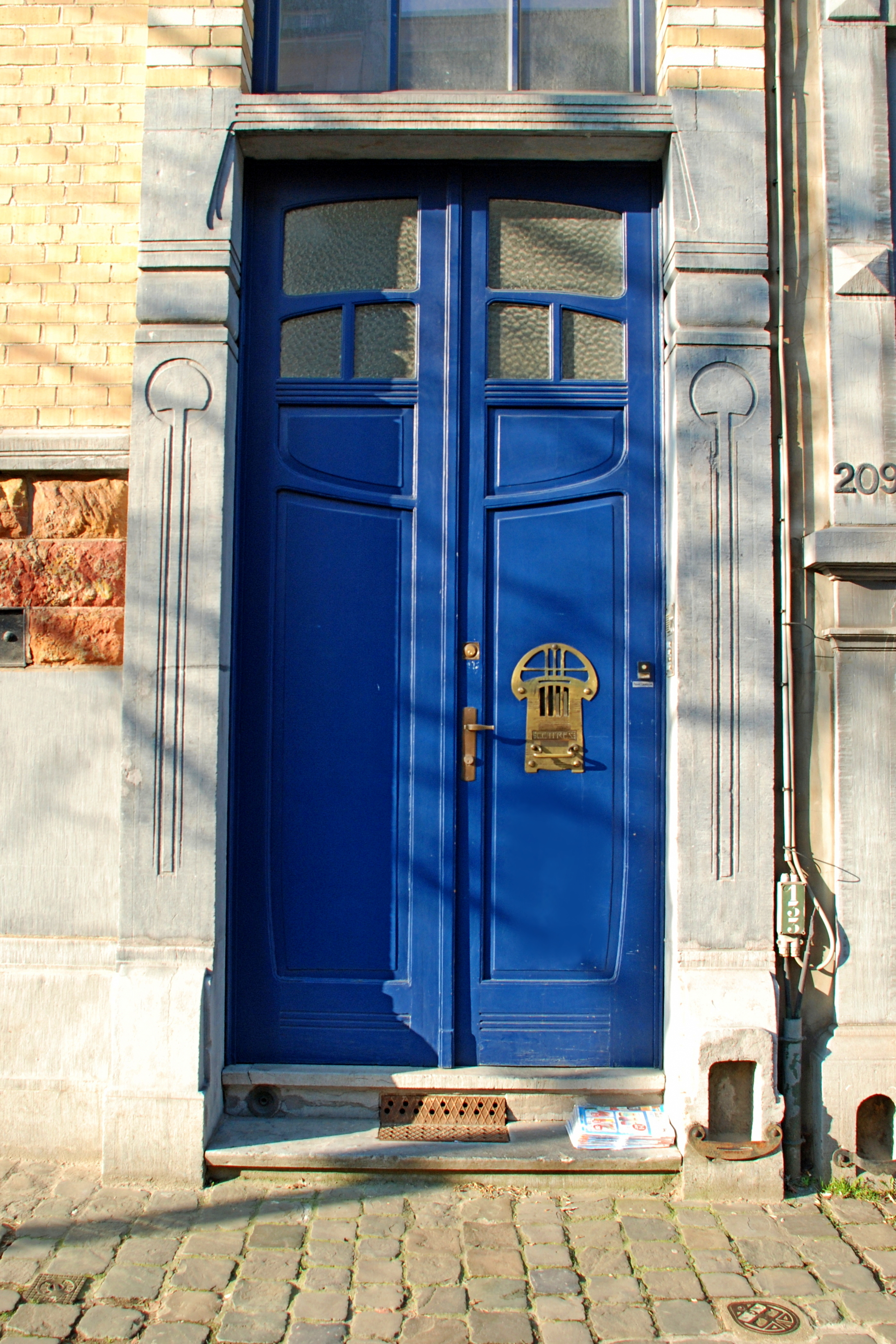 Belgique - Bruxelles - Maison-atelier du peintre Paul Verdussen (Art nouveau géométrique, architecte Paul Hamesse, 1901)